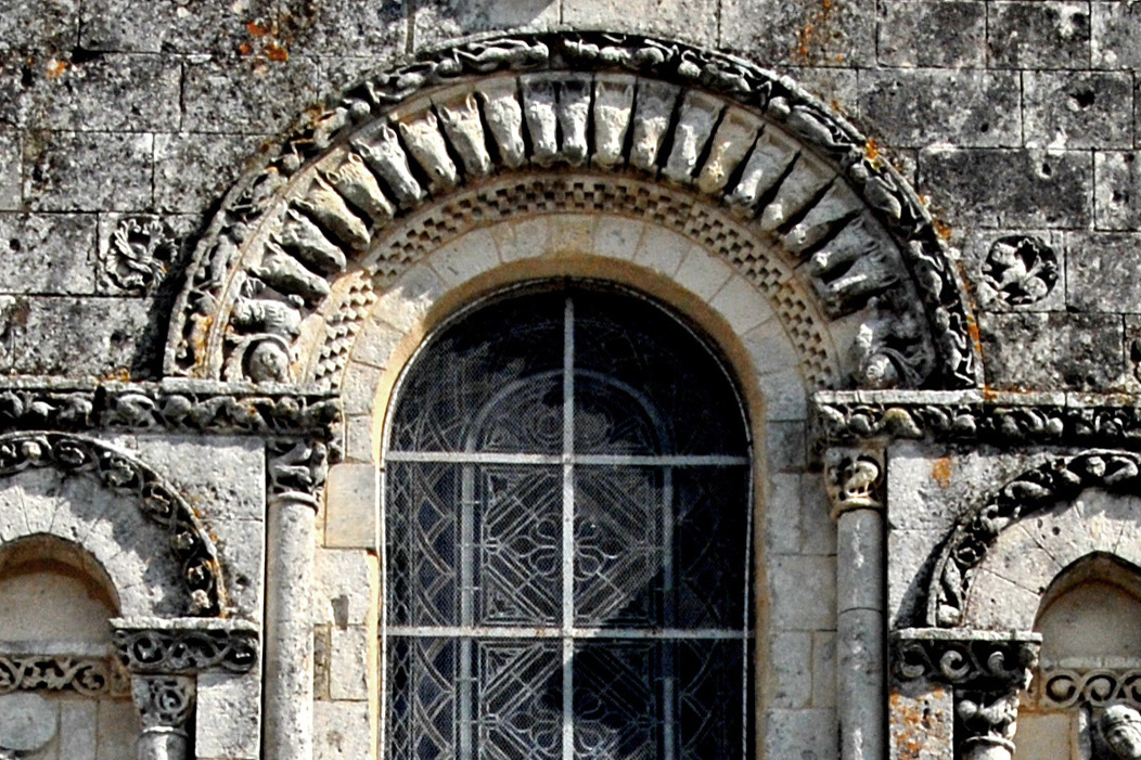 Pfarrkirche Saint-Pierre-de-Pérignac, Archivoltenfenster, mit Pferdeköpfen